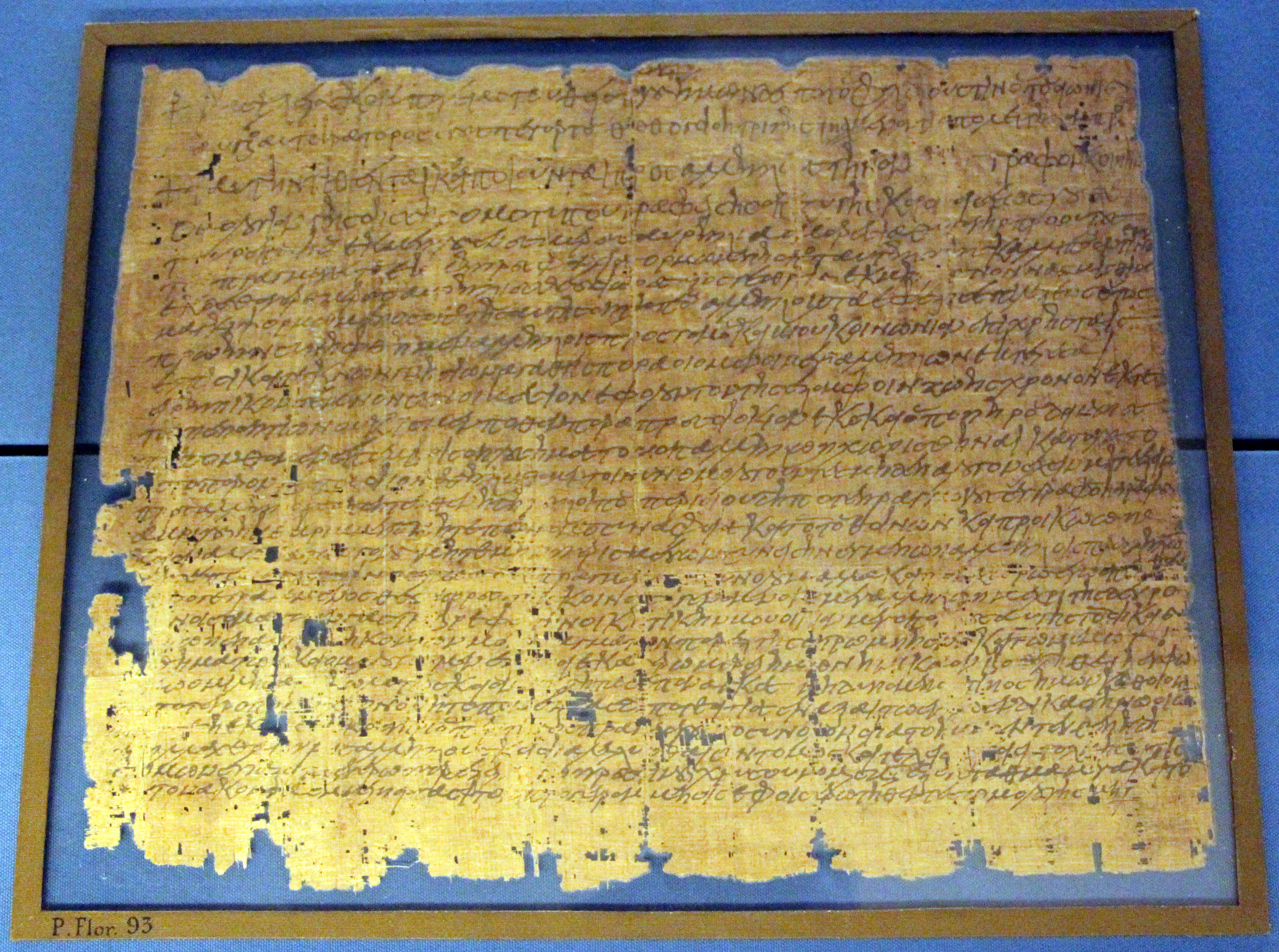 Biblioteca Medicea Laurenziana